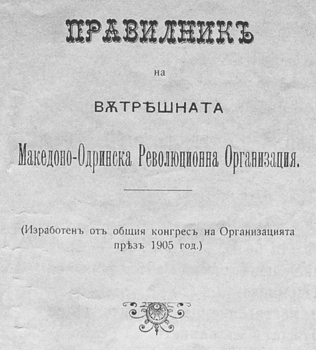 Правилник на ВМОРО от 1905 година.